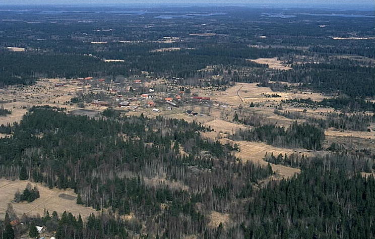 Motiv: Söderön Nyckelord: Flygbilder, Riksintressen Kategori: Miljöer, OdlingslandskapSöderön